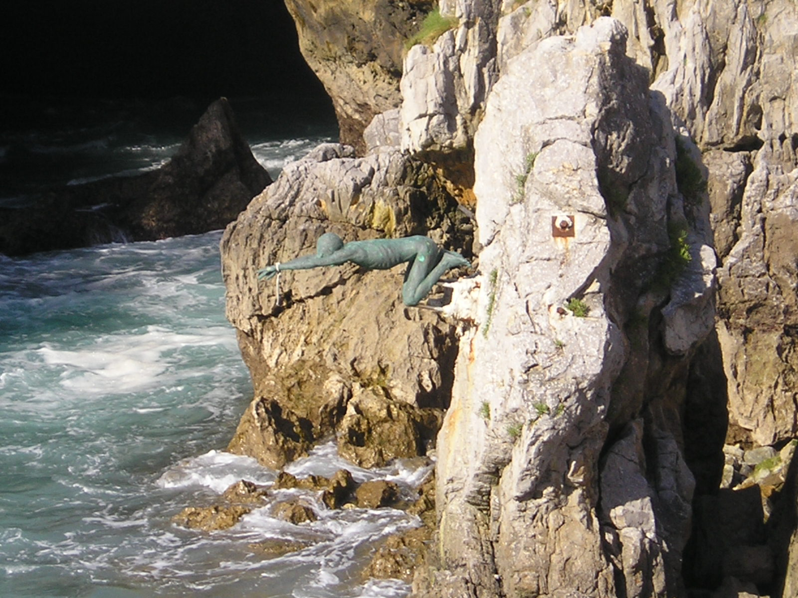 Castro Urdiales, localidad y municipio de Cantabria (España)